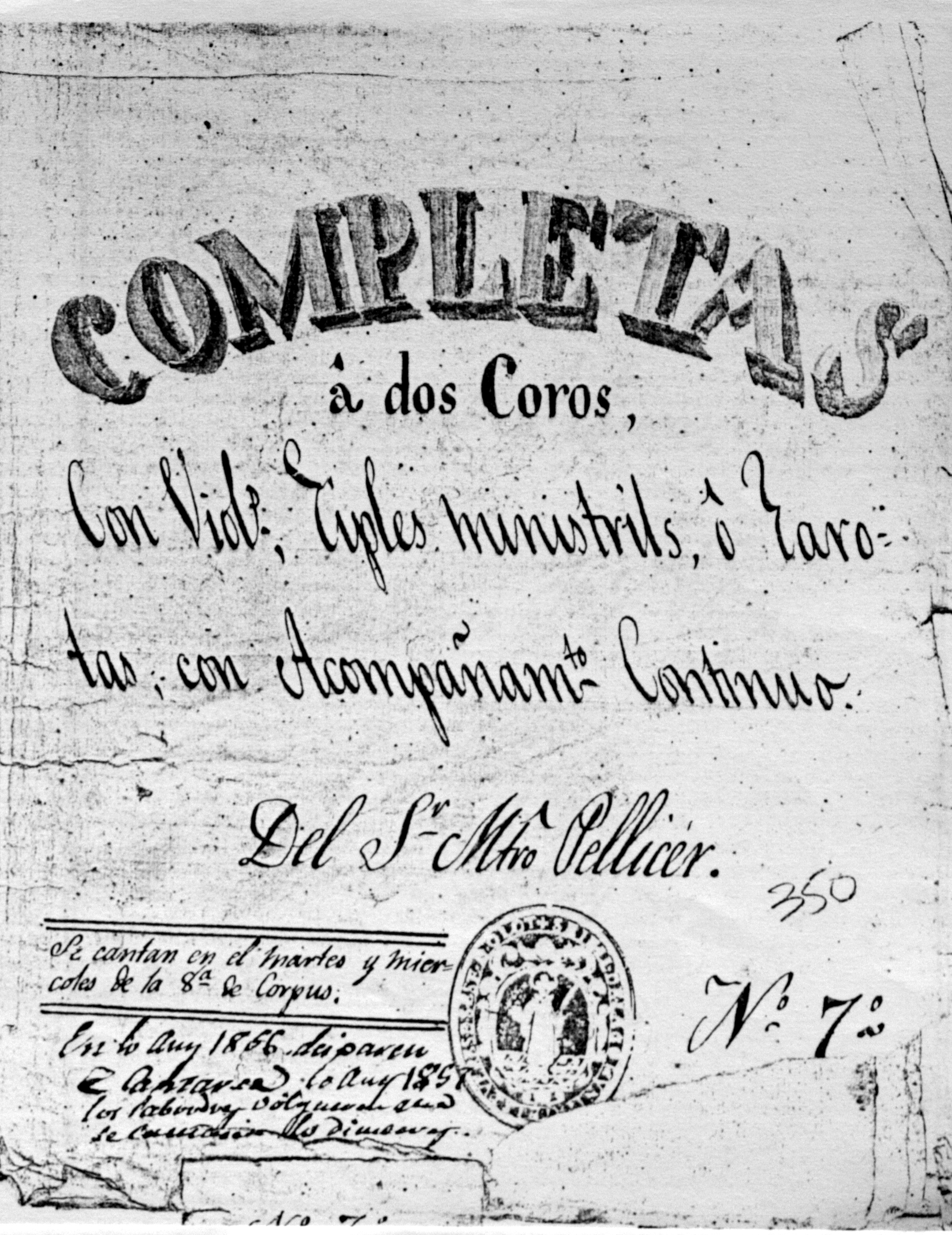 Portada d'unes completes amb acompanyament de ministrils conservat a la parròquia d'Olot